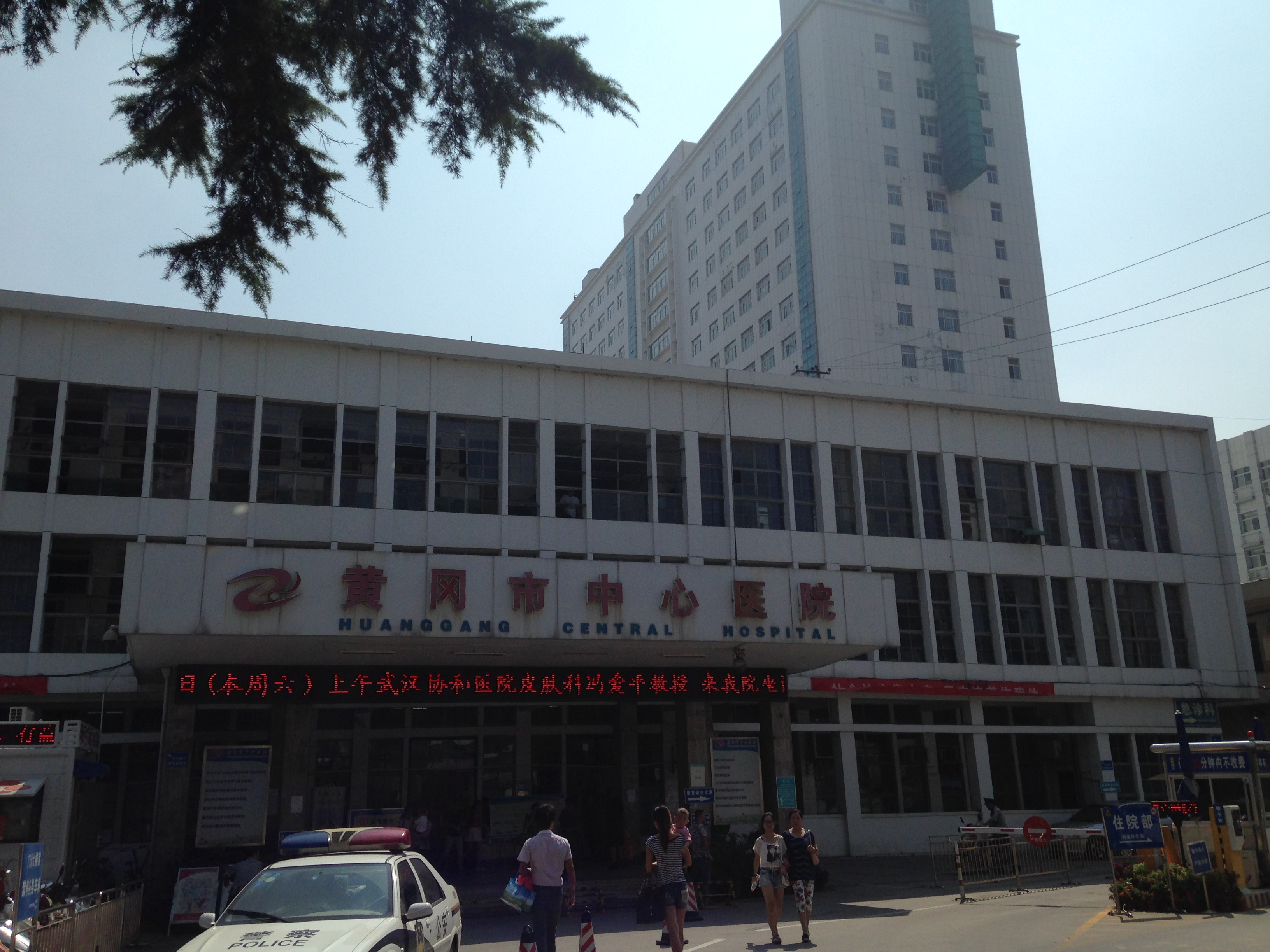 黄岡市中心医院